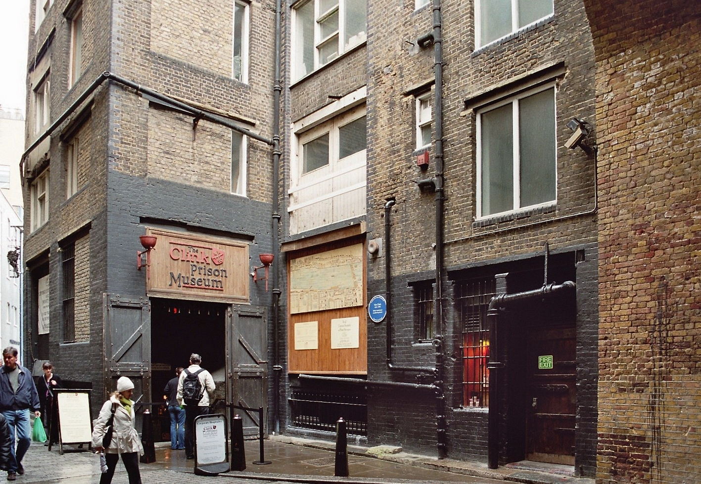 clink prison museum, London